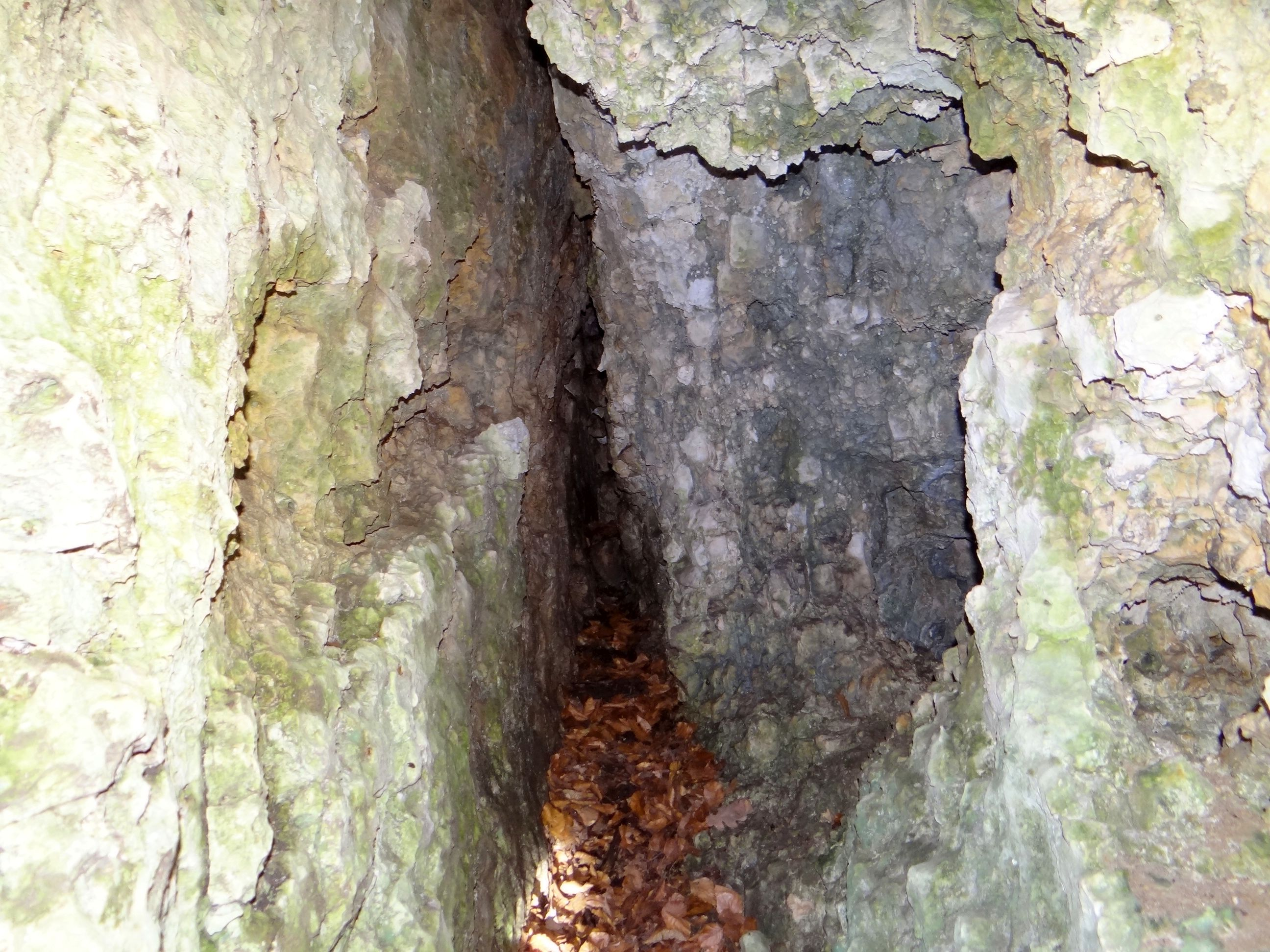 Szczelina w Środku Doliny (w Dolinie Kobylańskiej)